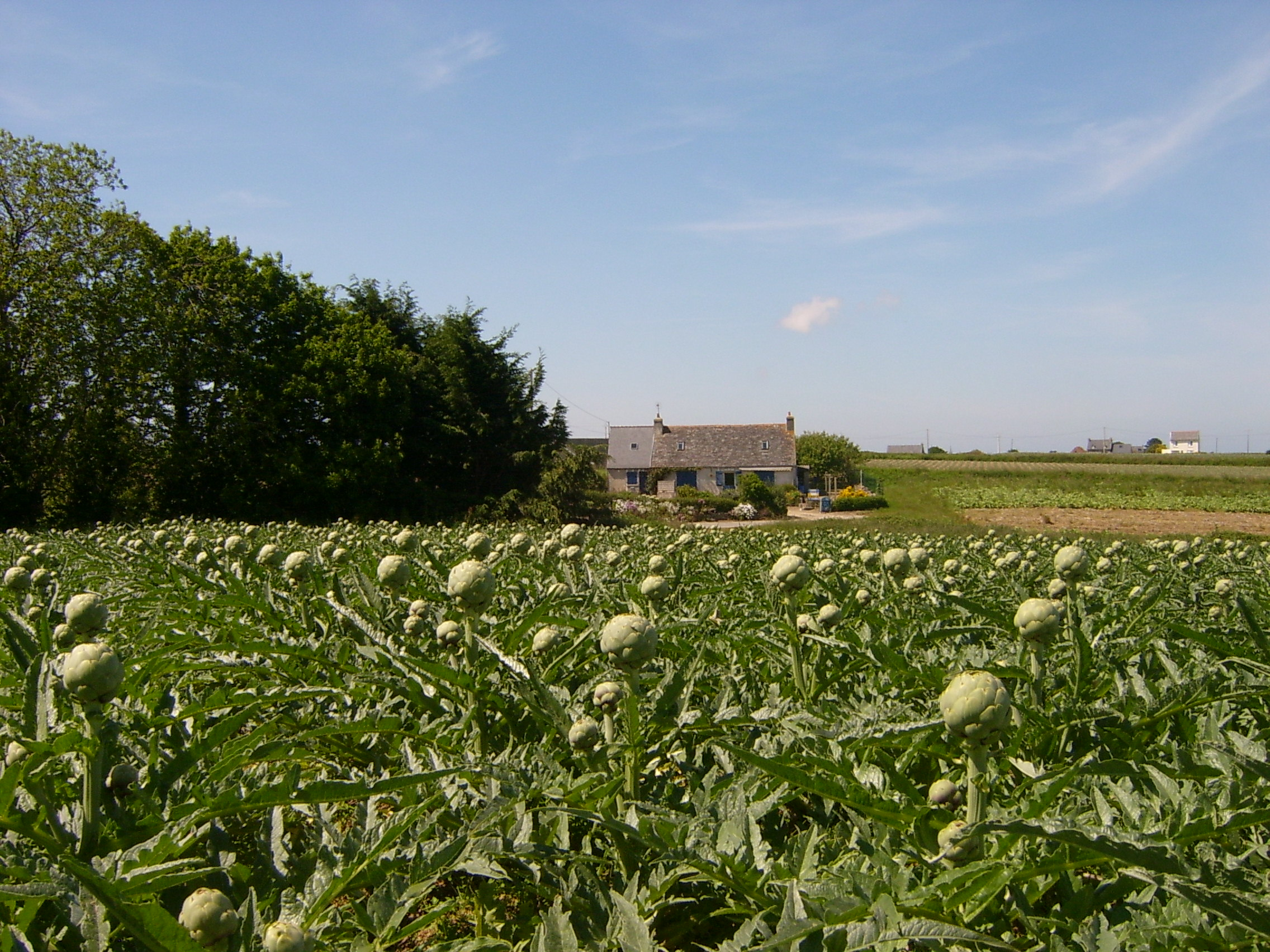 La maison dans les artichauts